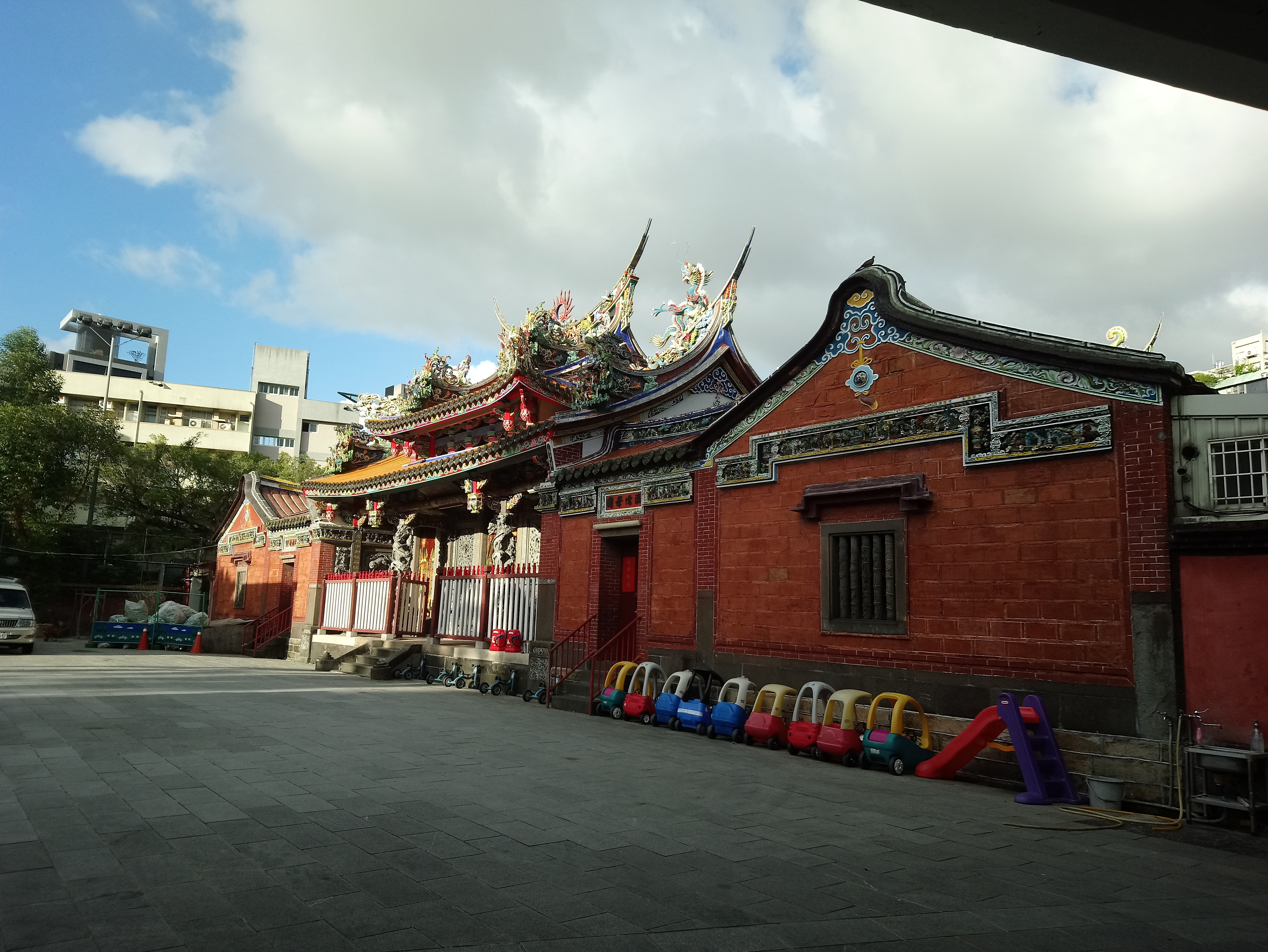 陳德星堂遠景,台北市大同區建成次分區星明里